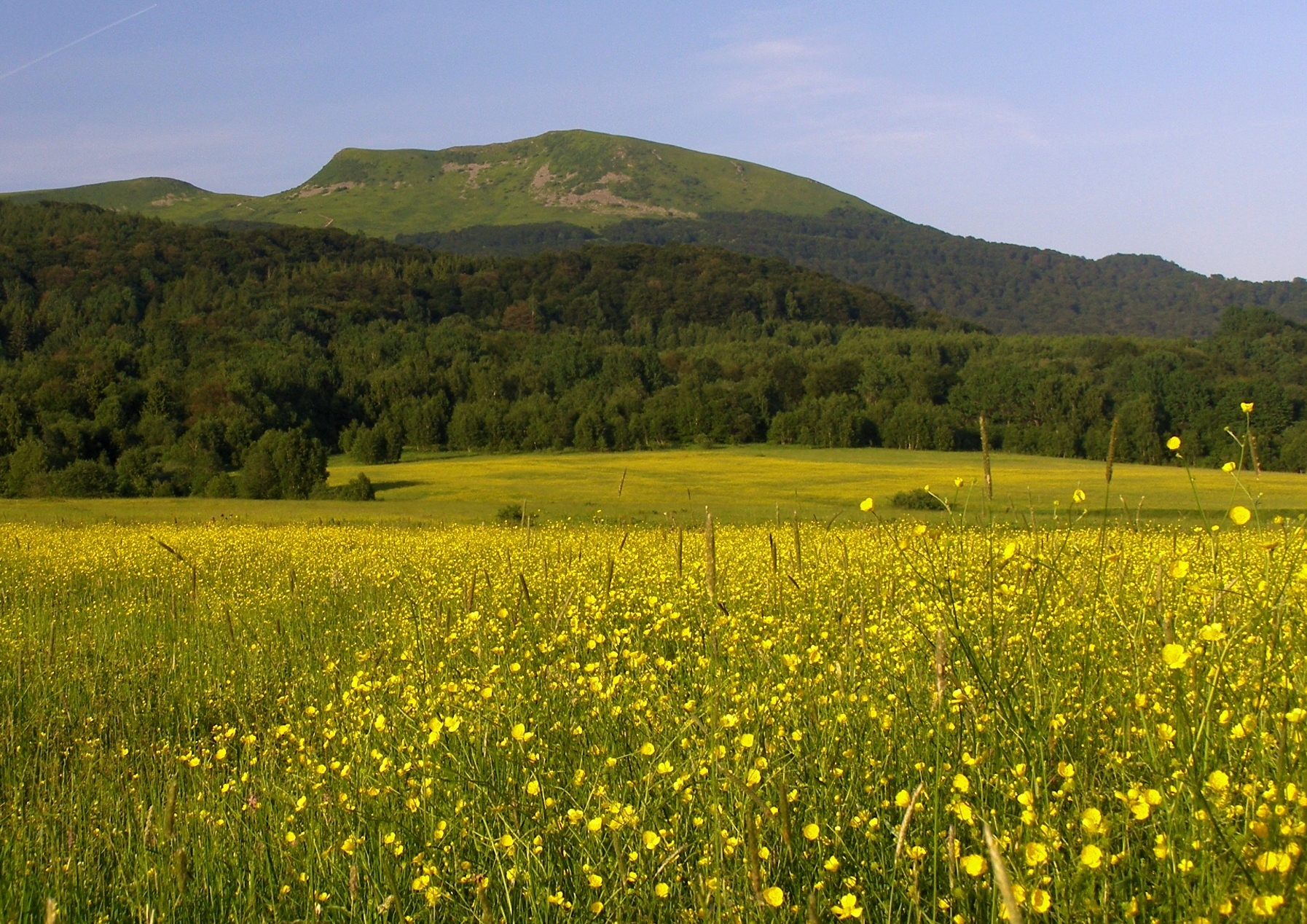 Tarnica (Bieszczady)